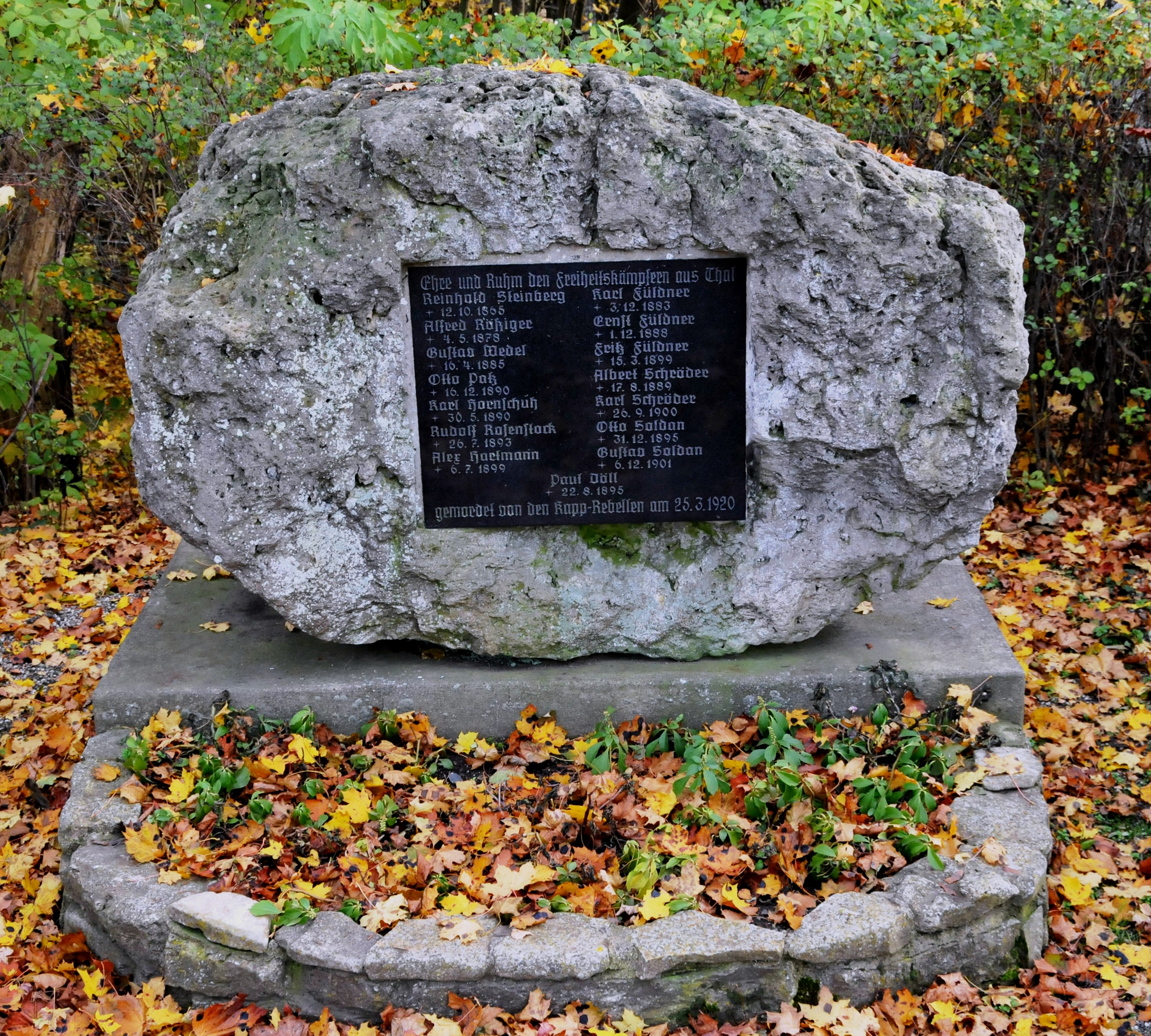 Gedenkstein "Mordopferdenkmal" bei Mechterstädt für die 15 Arbeiter, die am 25. März 1920 von Marburger Studenten eines militärischen Freikorps ermordet wurden.